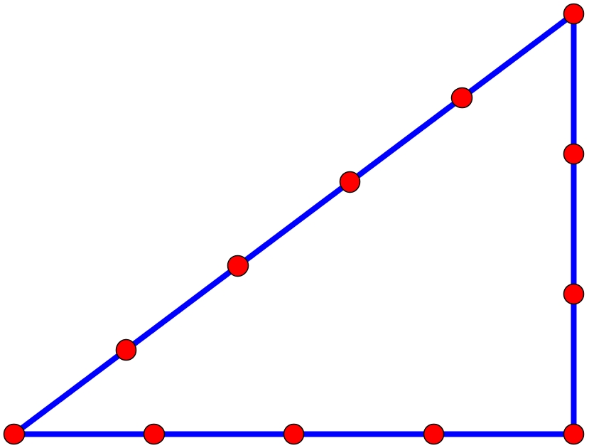 Inverse Aufspannung der Zwölfknotenschnur